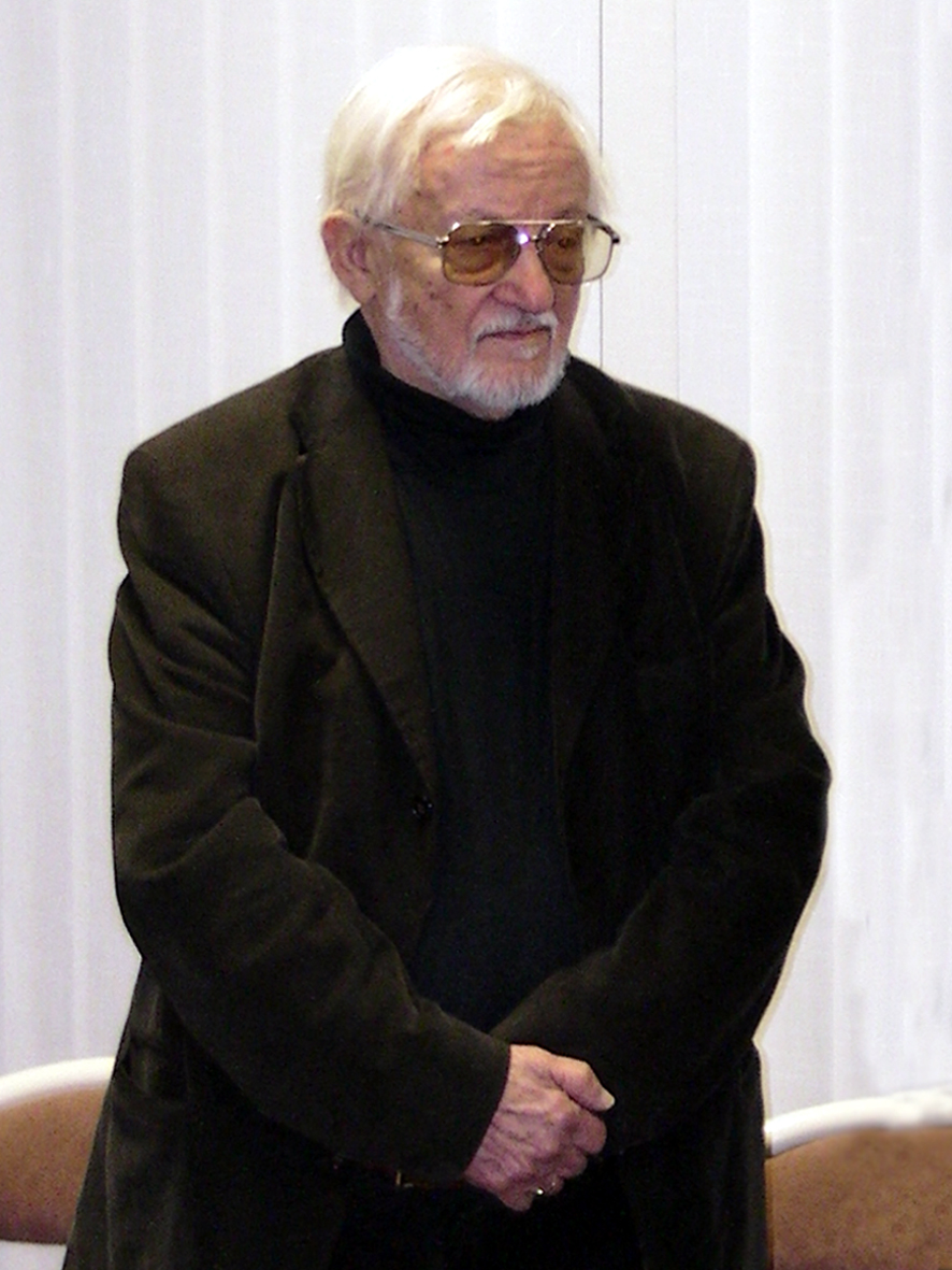 Akademický sochař a medailér Zdeněk Kolářský na křtu knihy Mezi orlem a pannou v knihovně Univerzity Pardubice.